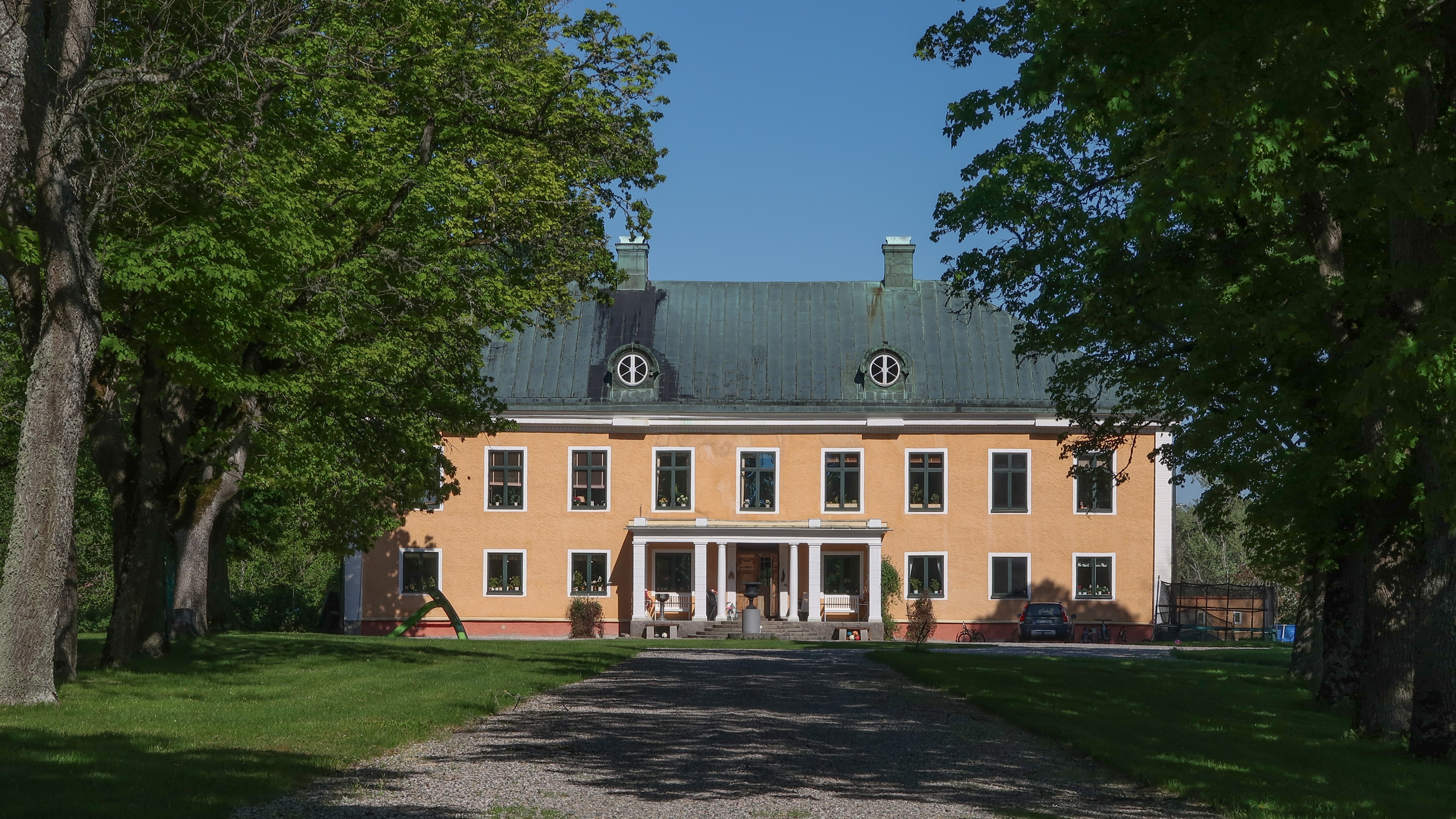 Herrgården från väster